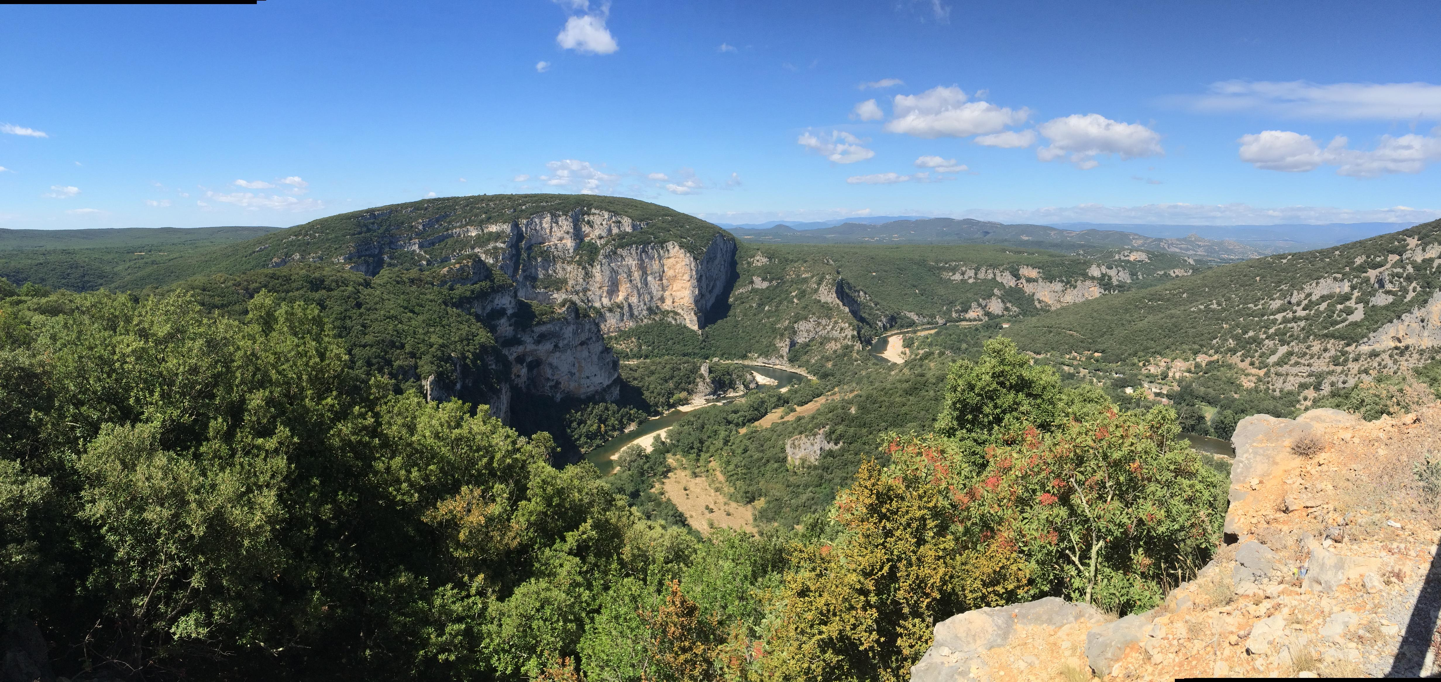 Les gorges de l'Ardèche